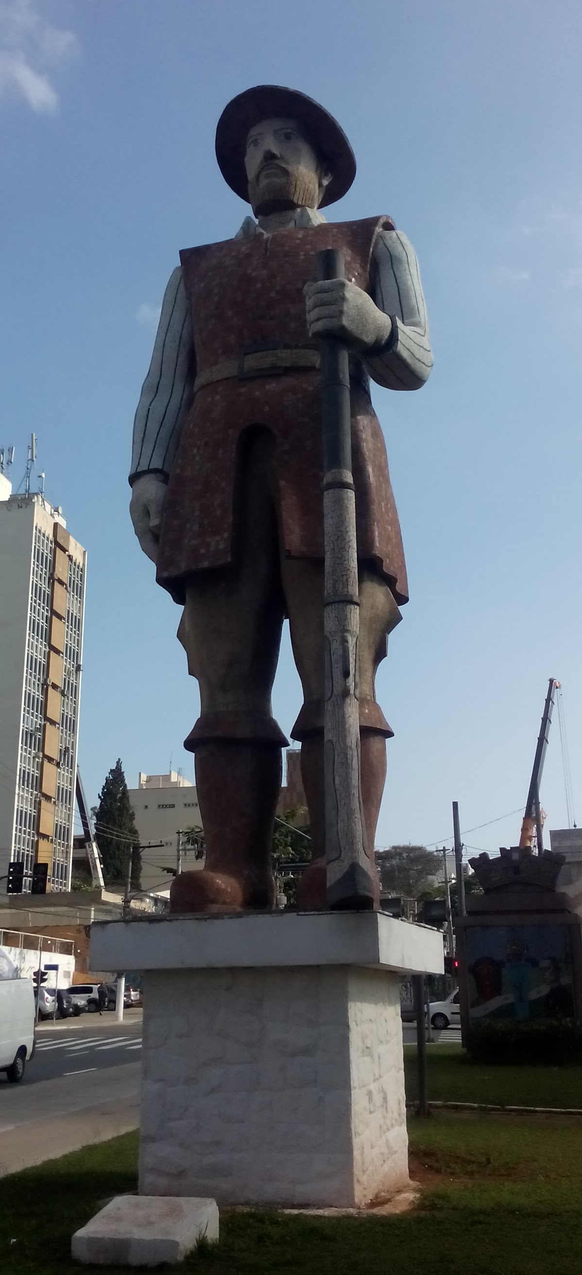 Estátua enorme de Borba Gato na Avenida Santo Amaro. No fundo, a construção da estação de Metrô Borba Gato (Linha 5 lilás)